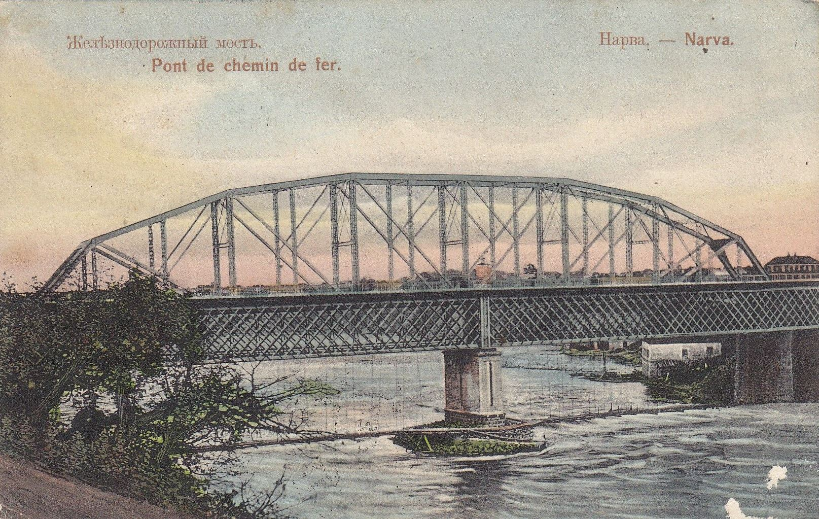 Narva raudteesild 1909. aasta poskaardil